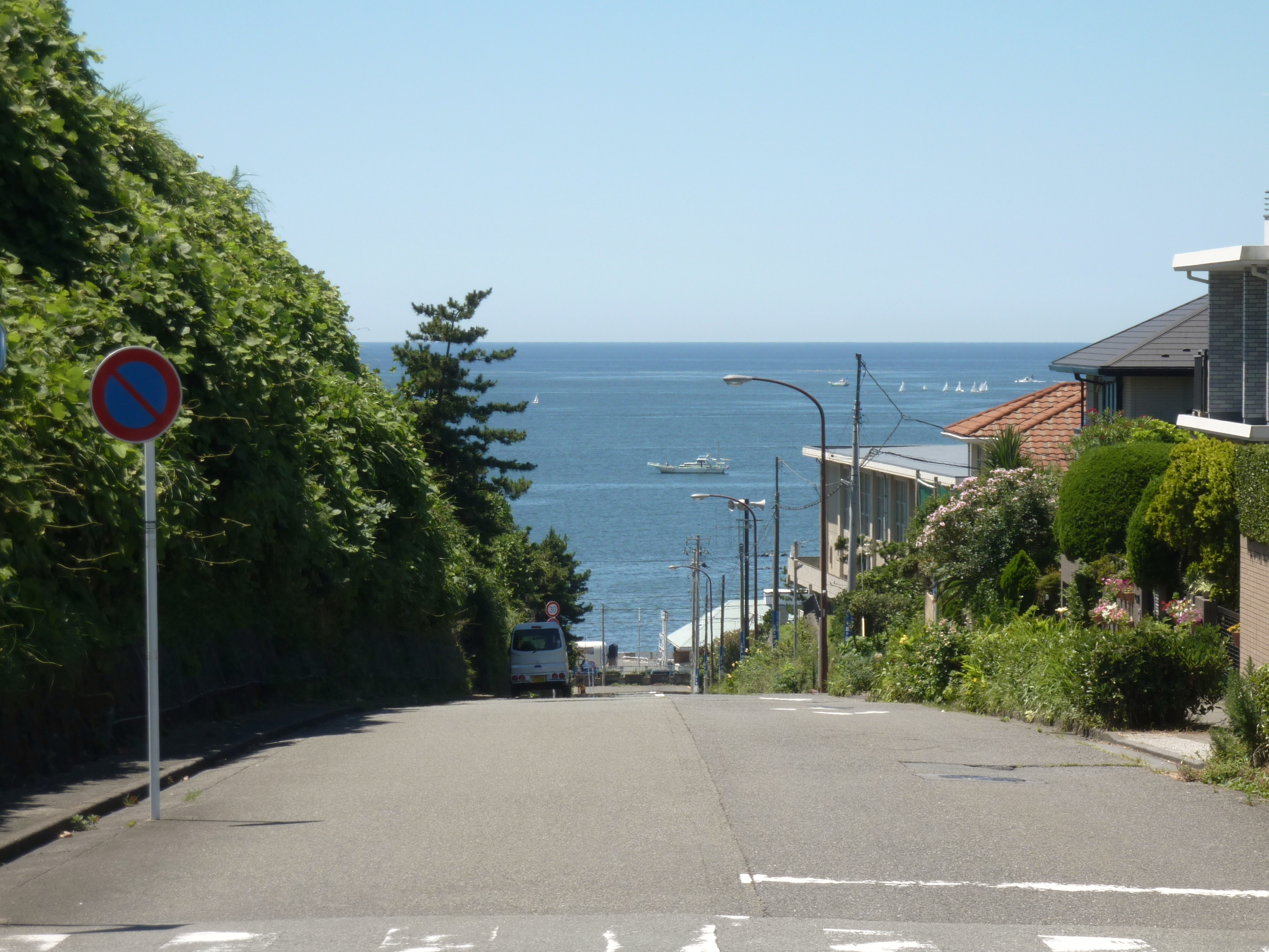 鎌倉市七里ガ浜（七里ヶ浜）の坂道